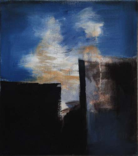 Öl/Leinwand